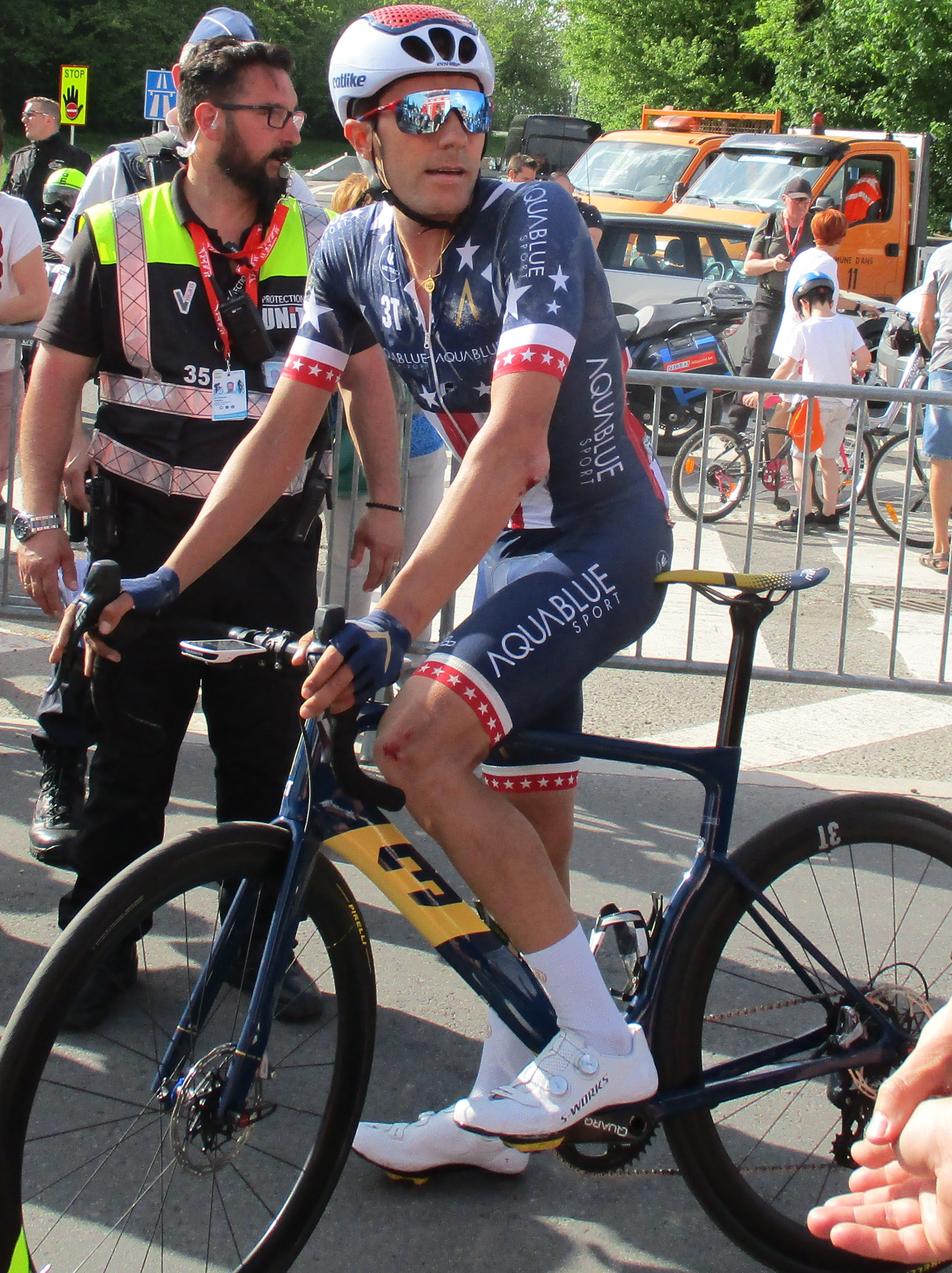 Finish van Luik-Bastenaken-Luik 2018 in Ans.